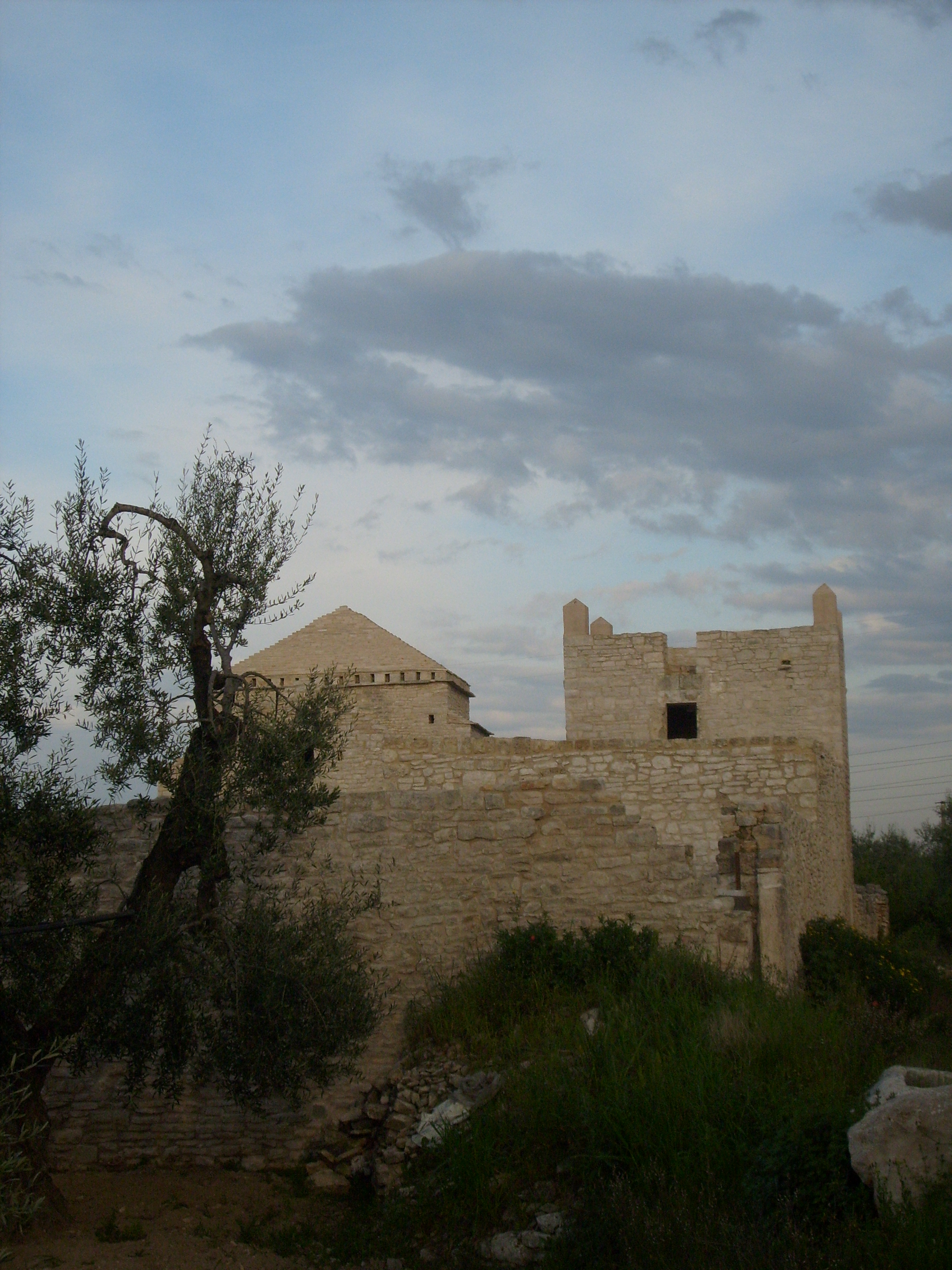 Il Casale di Pacciano